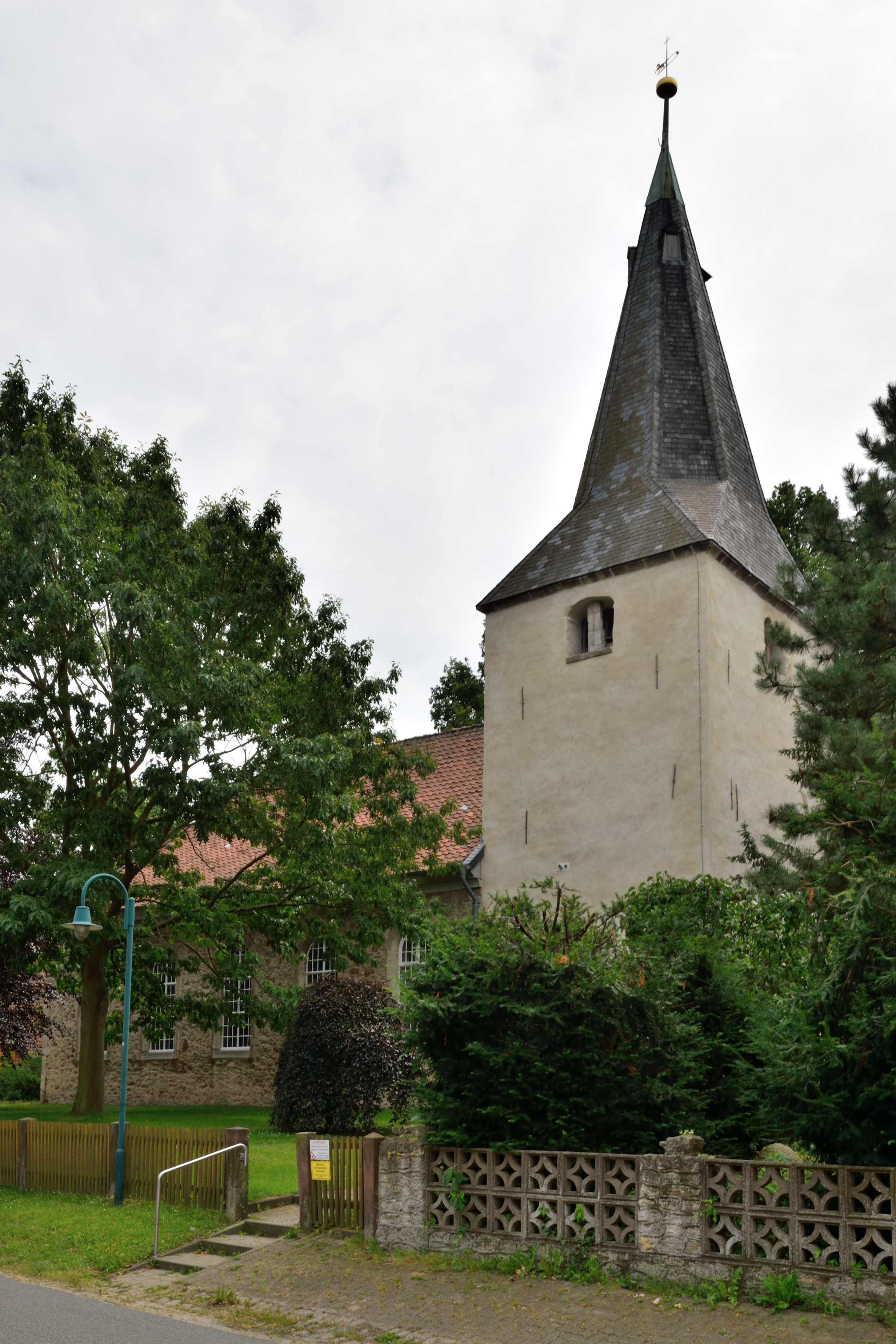 St.-Georgs-Kirche in Bortfeld